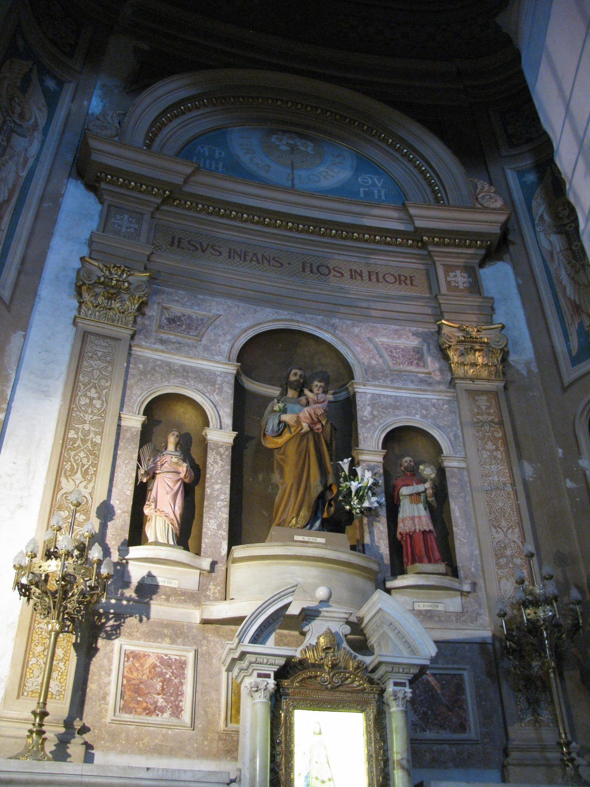 San José, San Ramón y Santa Lucía